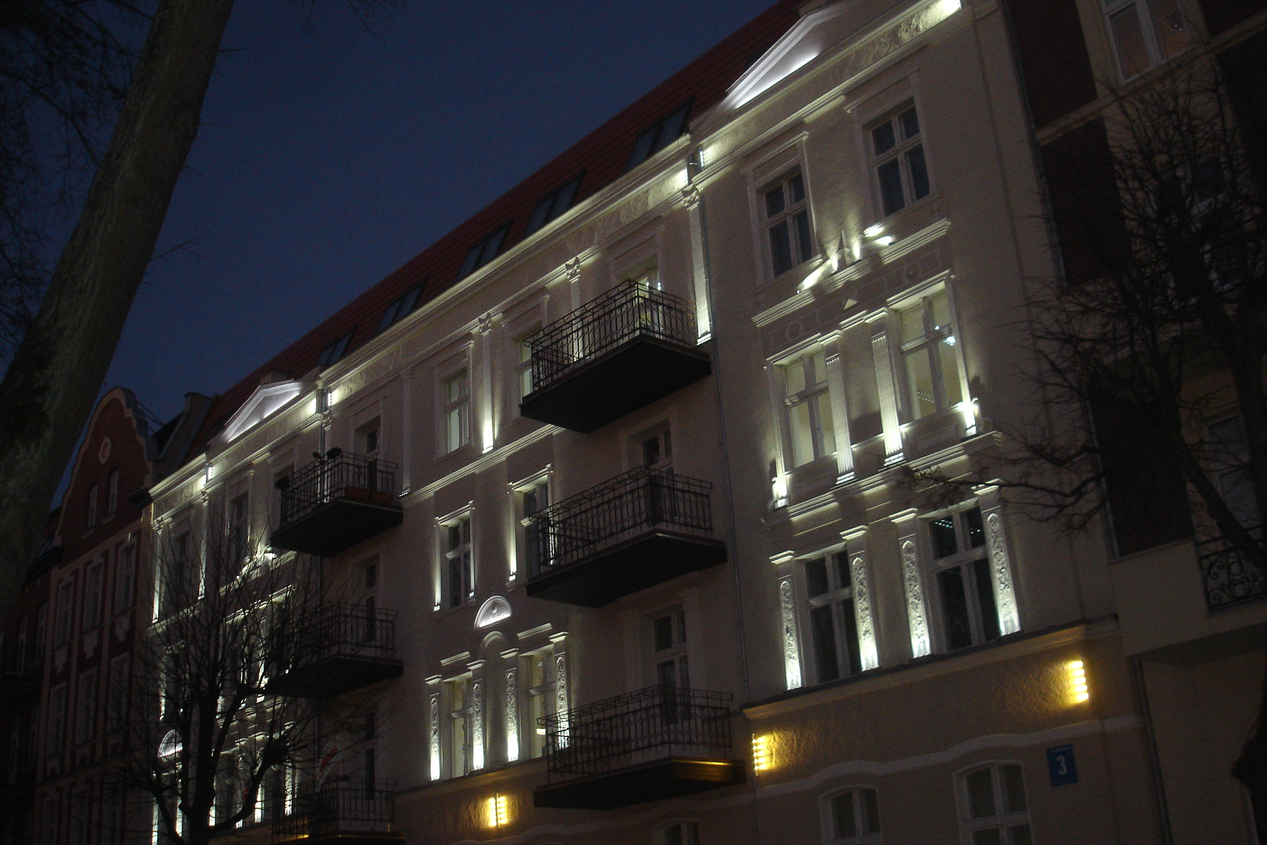 Kamienica przy ul. Jana i Hieronima Małeckich 3 w Ełku